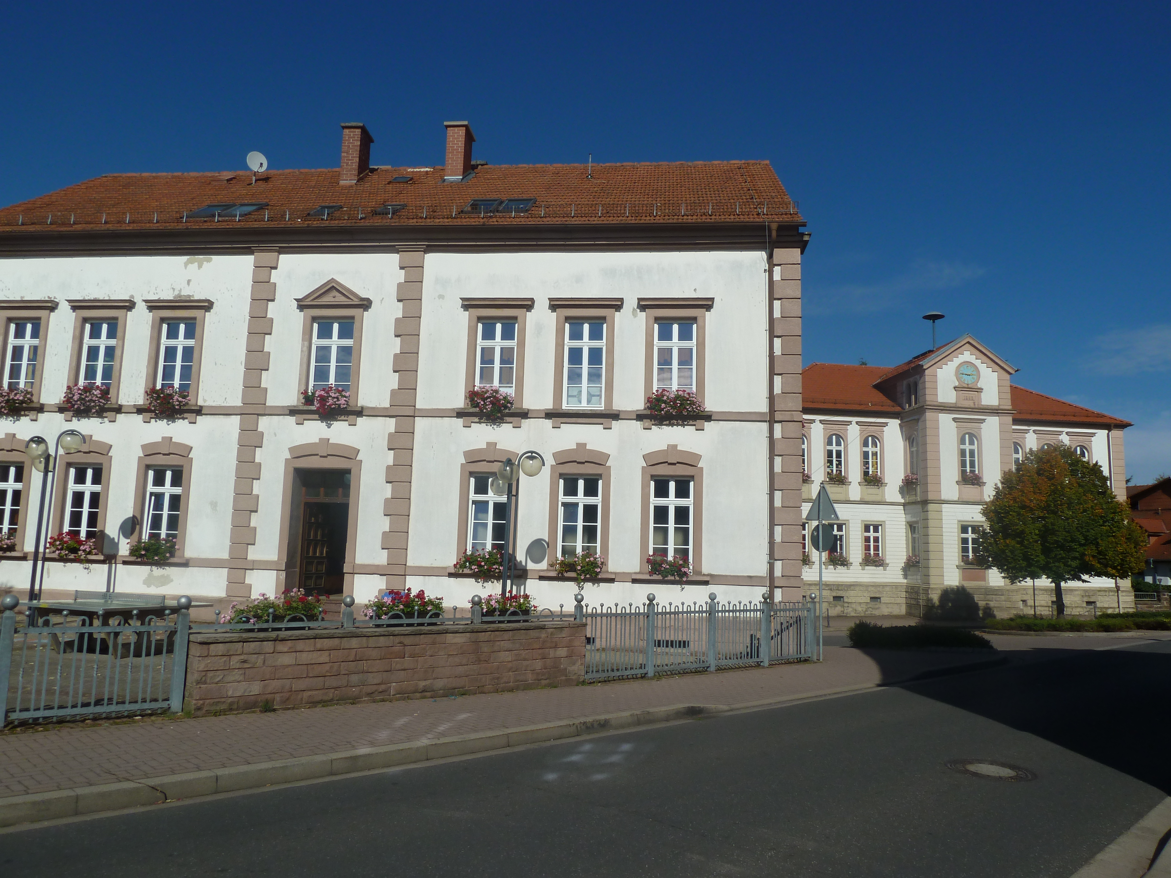 Ortsdurchfahrt von Heltersberg